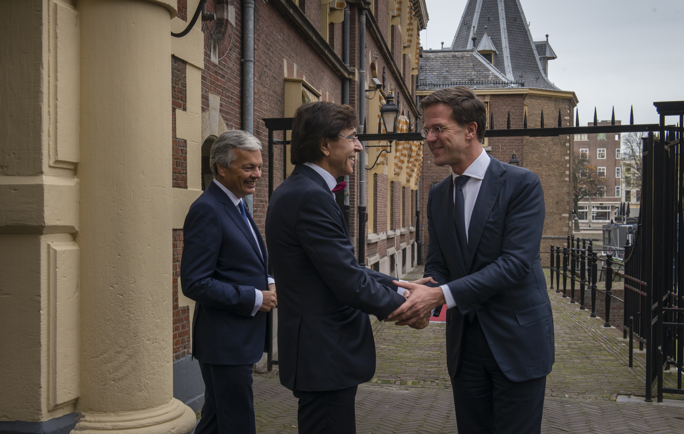 Minister-president Rutte verwelkomt zijn Belgische collega Elio Di Rupo voor de ingang van het Torentje. Rutte en Di Rupo hebben onder meer gesproken over het genereren van economische groei in Europa. Daarnaast hebben ze gesproken over de aanstaande Europese verkiezingen en de agenda van de nieuwe Commissie. Later op de dag ontmoet Rutte de Belgische Koning Filip en Koningin Mathilde voor een officiële kennismaking. Zij worden daarbij vergezeld door premier Di Rupo.